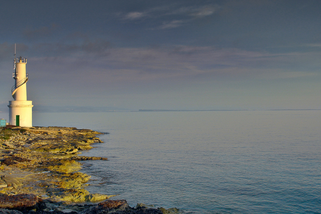 Fara de la Savina en Formentera, España.